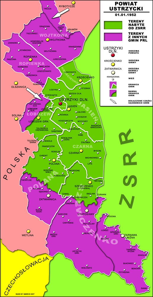 Mapa administracyjna powiatu ustrzyckiego (województwo rzeszowskie), stan z 1 stycznia 1952 roku, po przeprowadzeniu umowy o zamianie granic z 15 lutego 1951 roku